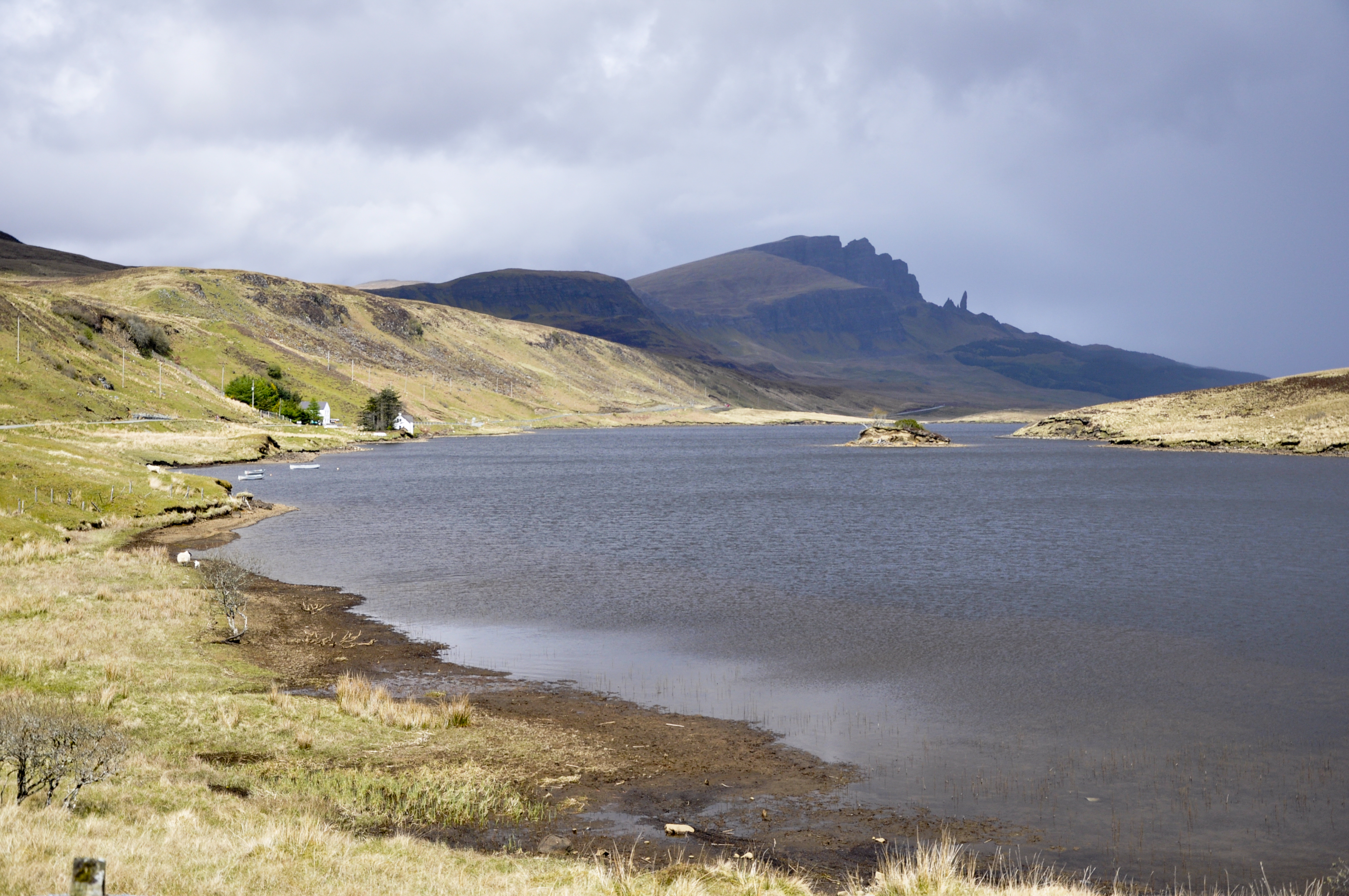 The Storr, met Loch Fada op de voorgrond, Trotternish, Skye, Schotland